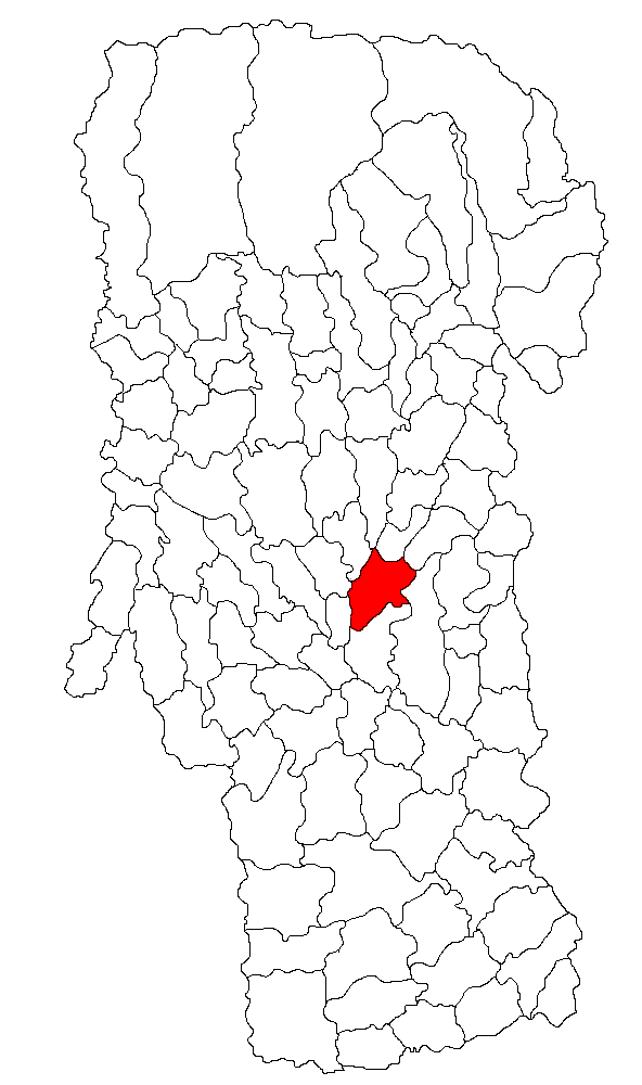 Categorie:Hărţi ale judeţului Argeş